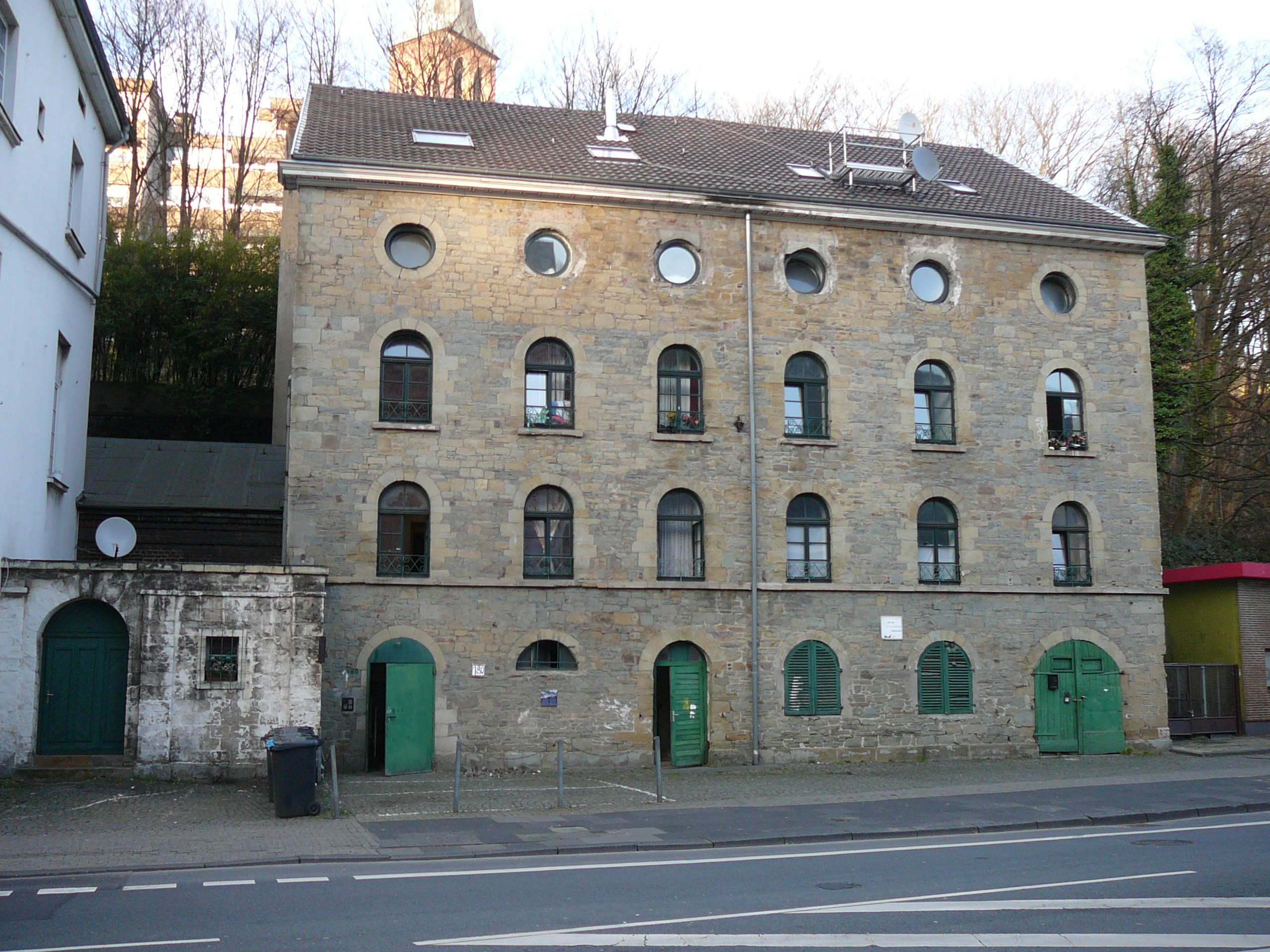 Friedrich-Ebert-Str., Wuppertal